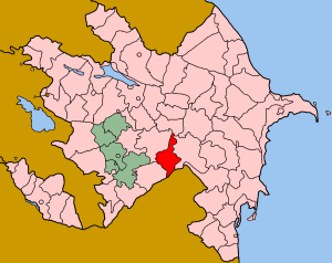 Map of Azerbaijan showing Beylagan (Beyləqan) rayon.